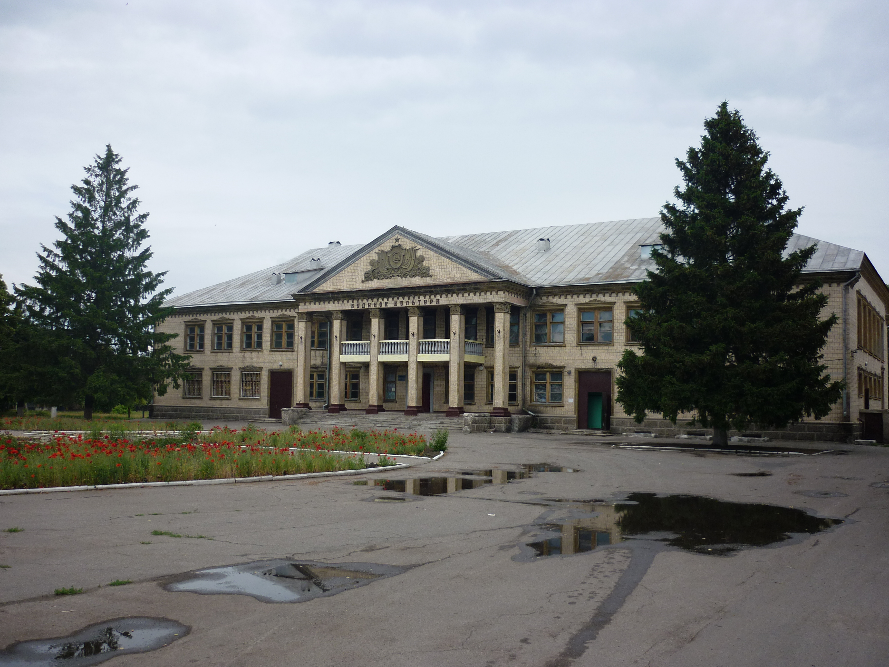 село Леськи Черкаського району Черкаської області, Україна